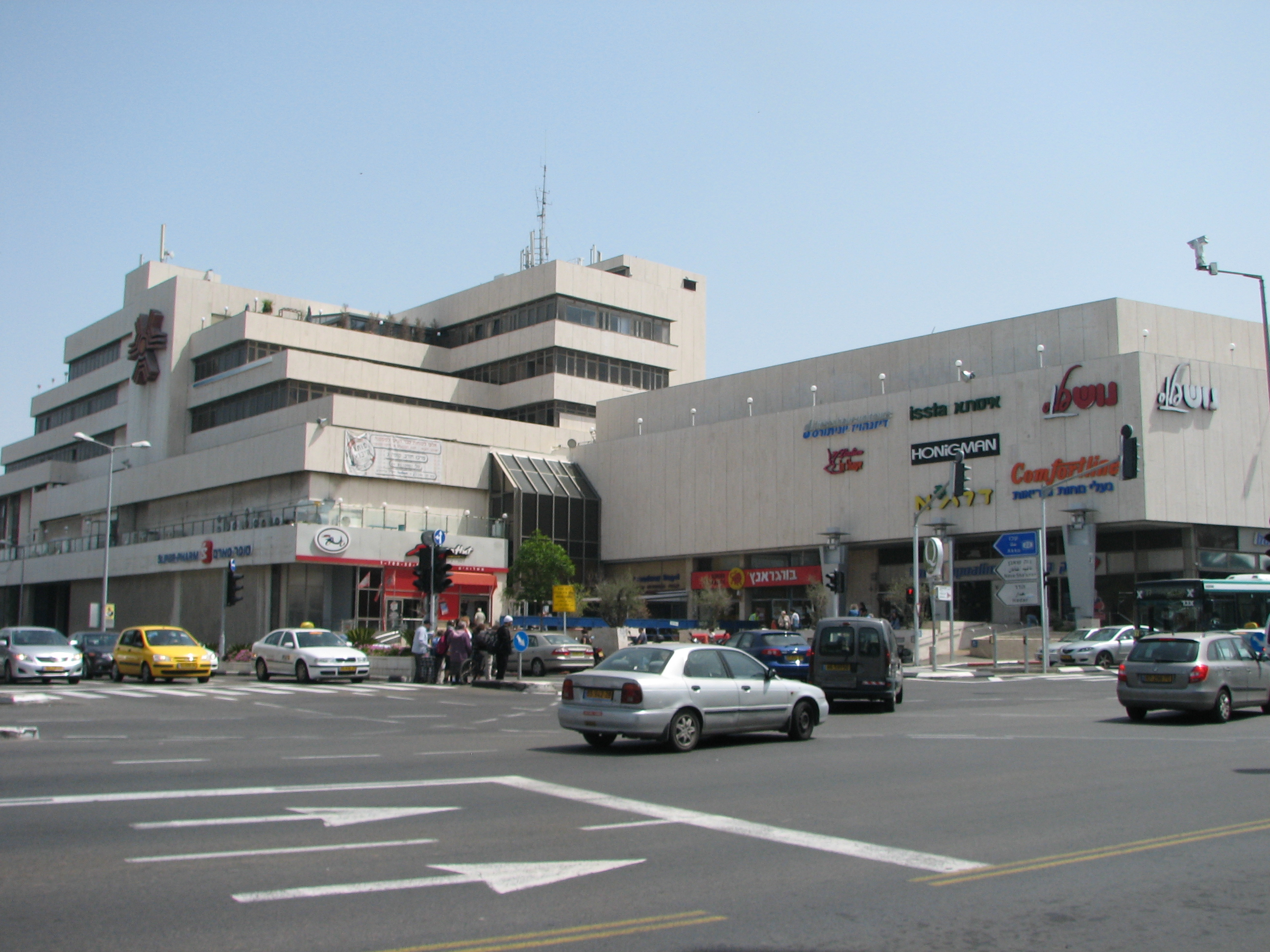 Ahuza, Haifa, Israel שכונת אחוזה, או בשמה המלא אחוזת שמואל, נוסדה בשנות השלושים של המאה העשרים, על הר הכרמל במקום התיישבו בתחילה 22 משפחות. נקראת על שמו של הנציב העליון הרברט סמואל מרכז חורב , על רקע כיכר חורב